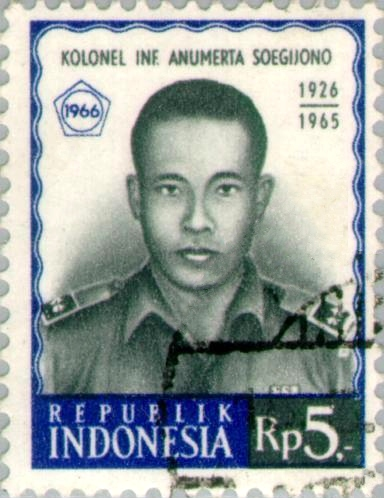 Sugiyono Mangunwiyoto